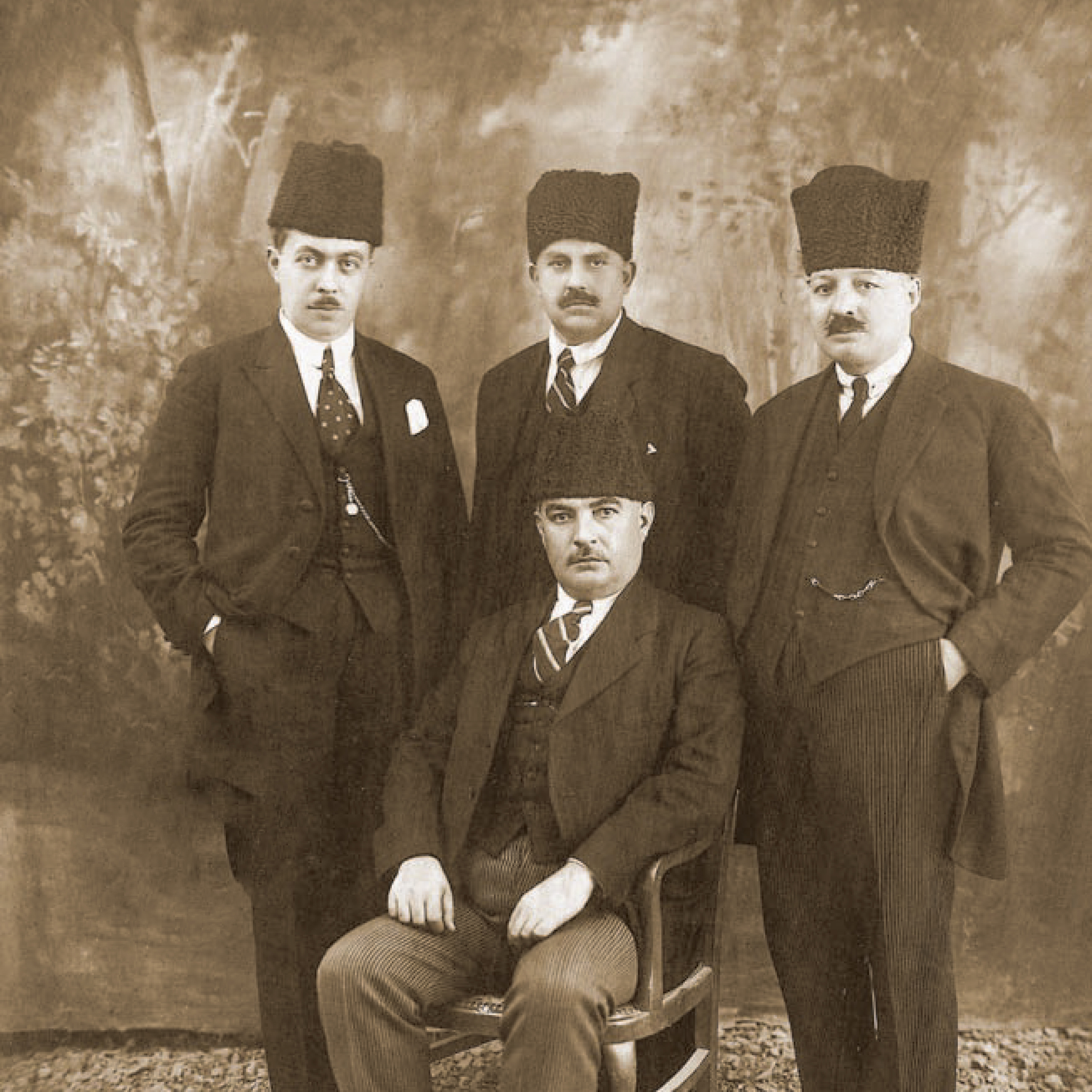 Halit Hami Mengi